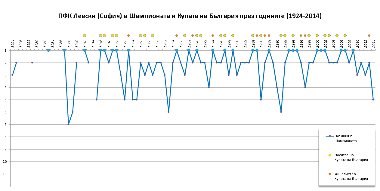 ПФК Левски (София) в Шампионата и Купата на България през годините (1924-2014)